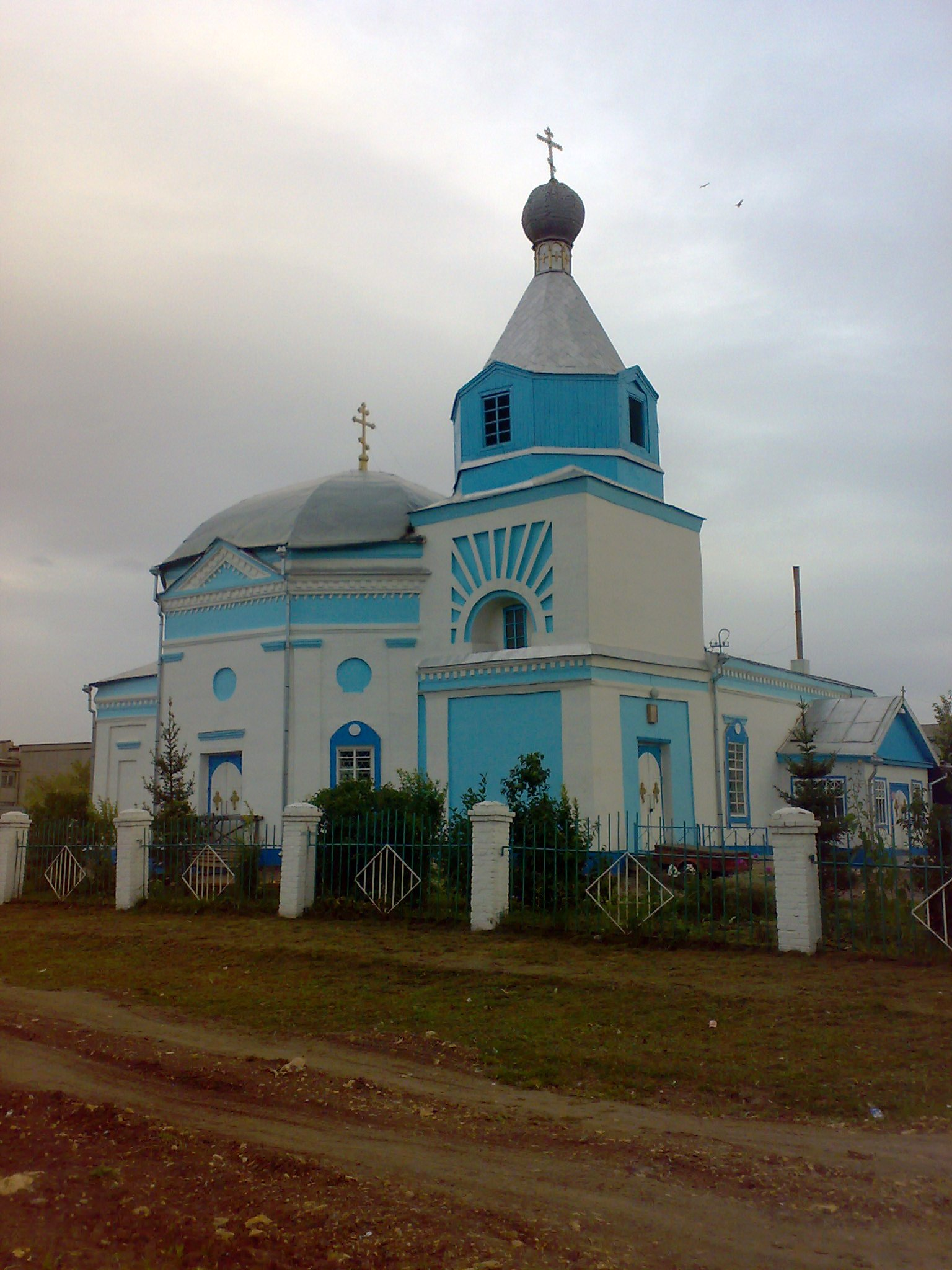 церковь в селе Ужур